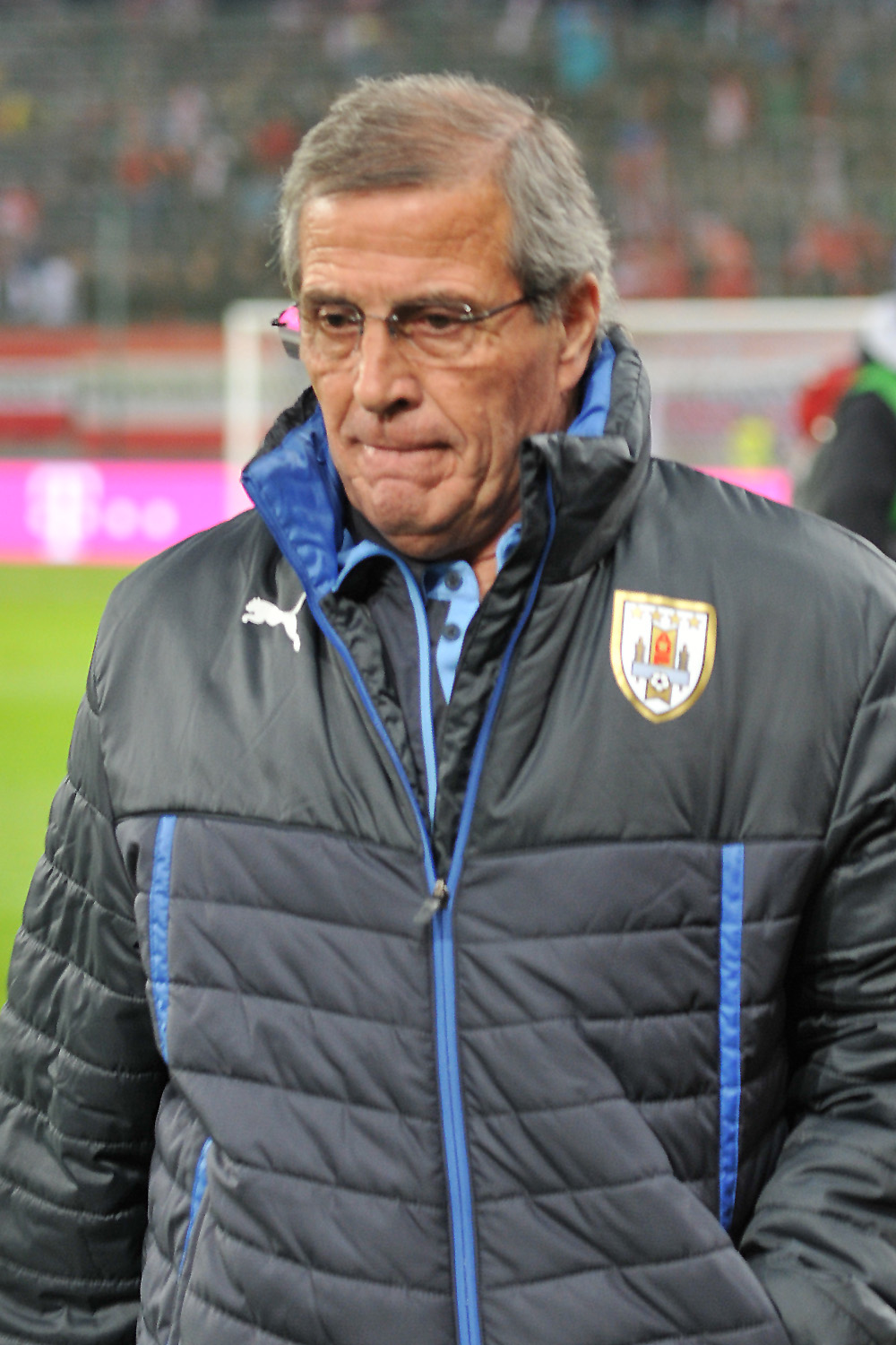 Freundschaftliches Länderspiel Österreich - Uruguay am 5. März 2014 in Klagenfurt: Óscar Tabárez